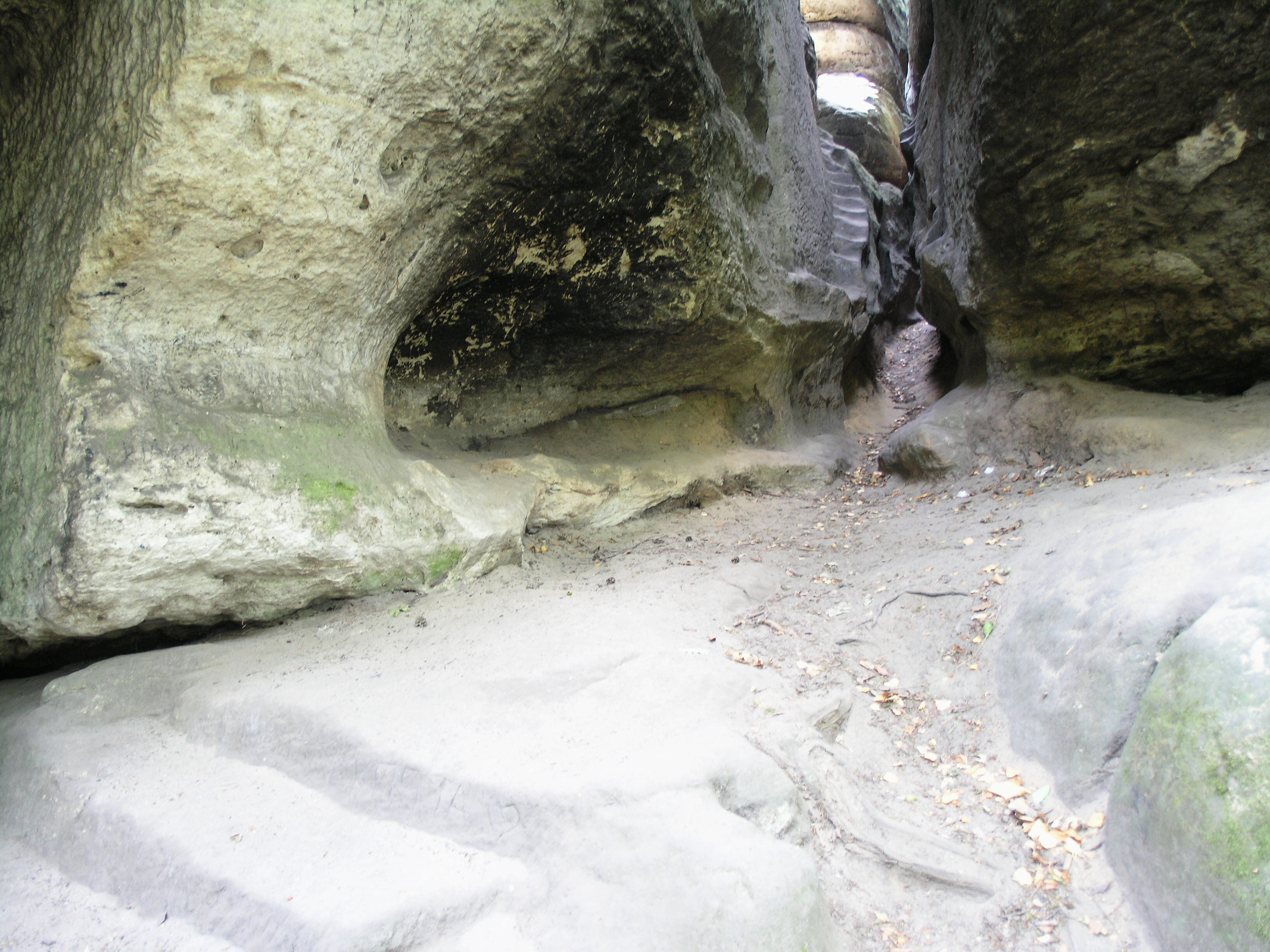 Nedamy - schody Project: Chráněná území.